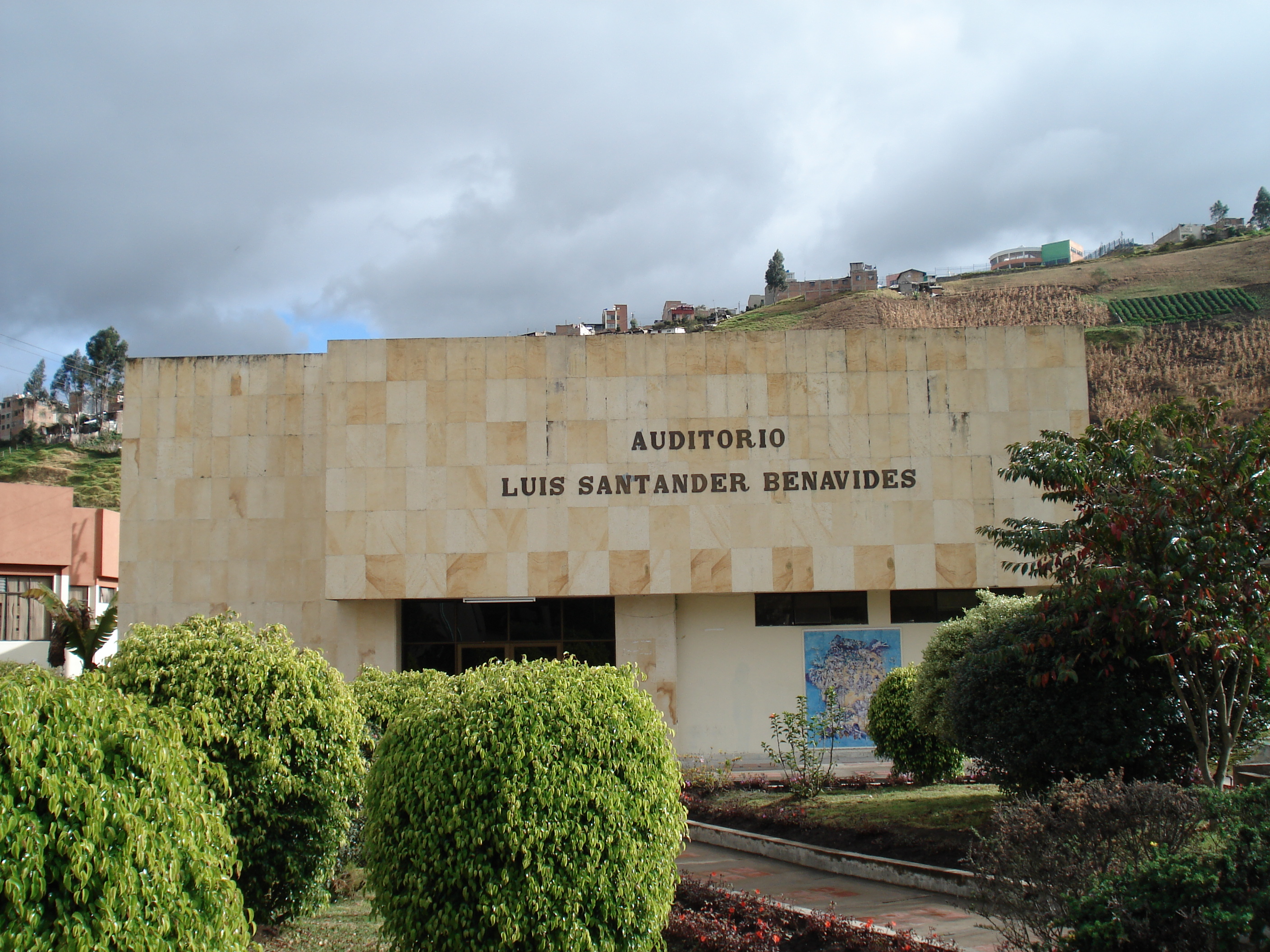 Auditorio Luis Santander Benavides, Universidad de Nariño, Pasto.